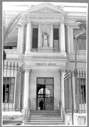 El Hospital San Vicente de Paul, también conocido como Lazareto de San Vicente de Paul, fue el primer Hospital Clínico de la Universidad de Chile, y estaba situado en el mismo lugar de la actual Escuela de la Medicina, en la manzana comprendida entre las actuales calles Profesor Zañartu por el norte, Santos Dumont hacia el sur, Avenida Independencia por el poniente y Avenida La Paz hacia el oriente, en la comuna de Independencia, en Santiago de Chile. Ubicado al interior del recinto perteneciente al actual Hospital Clínico José Joaquín Aguirre, Campus Norte de la Facultad de Medicina de la Universidad de Chile, en calle Santos Dumont 991 (aunque a veces se da la dirección del Hospital Clínico, que está a la altura del 999 de la misma calle), se encuentra la capilla del antiguo Lazareto, que fue declarada Monumento Histórico Nacional el 12 de enero de 1981, bajo el Decreto Supremo Nº 73.1 La capilla es una de las pocas estructuras sobrevivientes del ex Hospital.